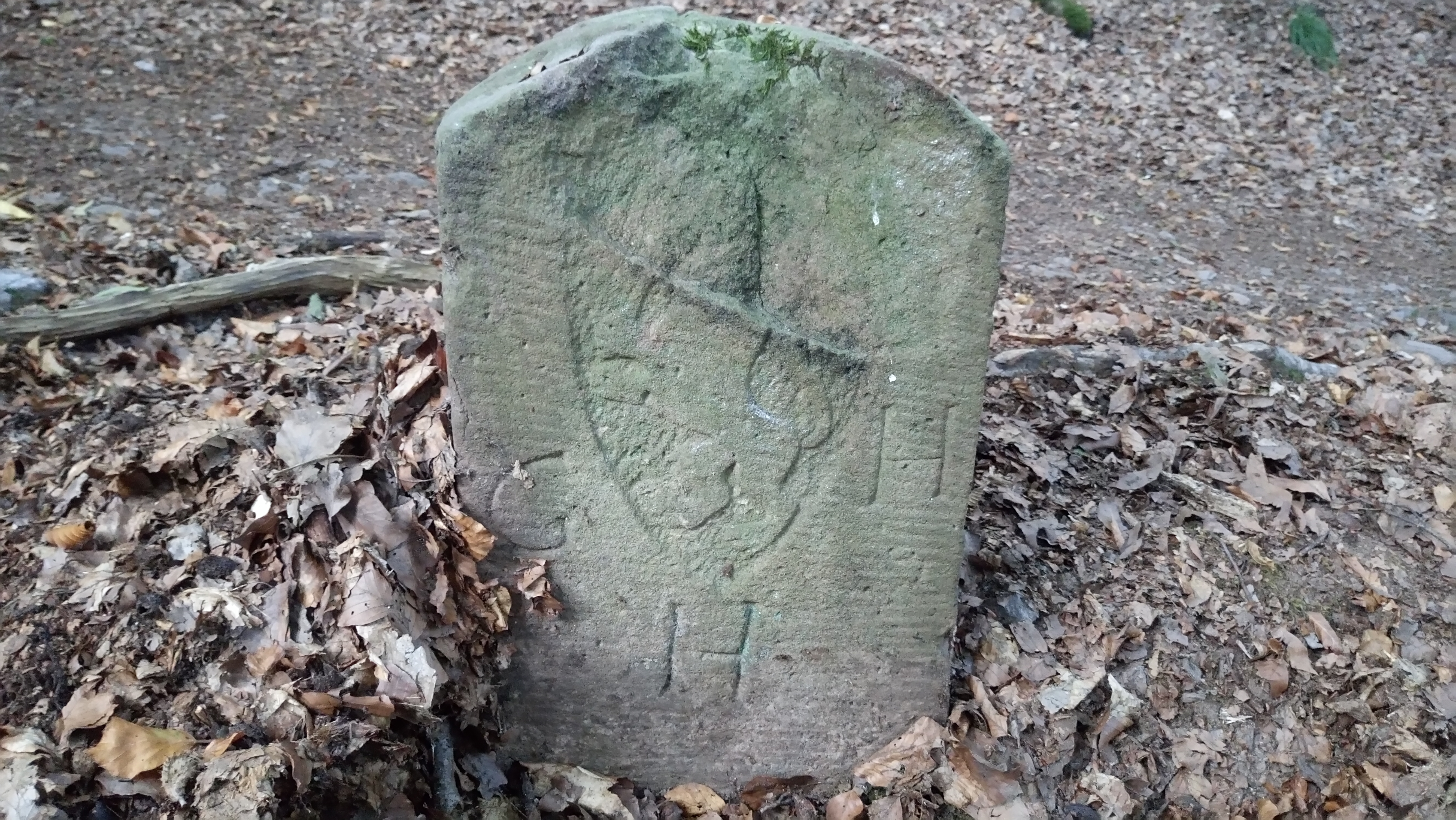 Grenzstein 201 unterhalb des Steinbruches zwischen Hemsbach und Brücken